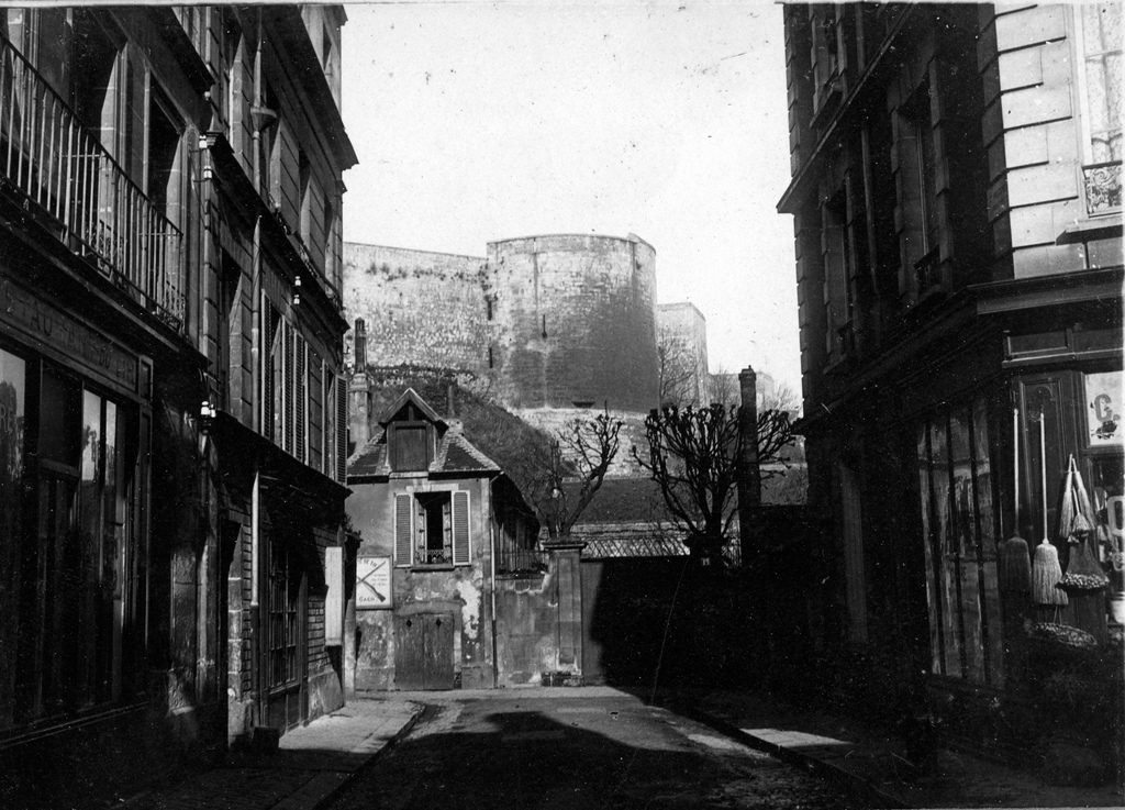 le château de Caen (tour de la reine Mathilde), probablement depuis la rue Graindorge.